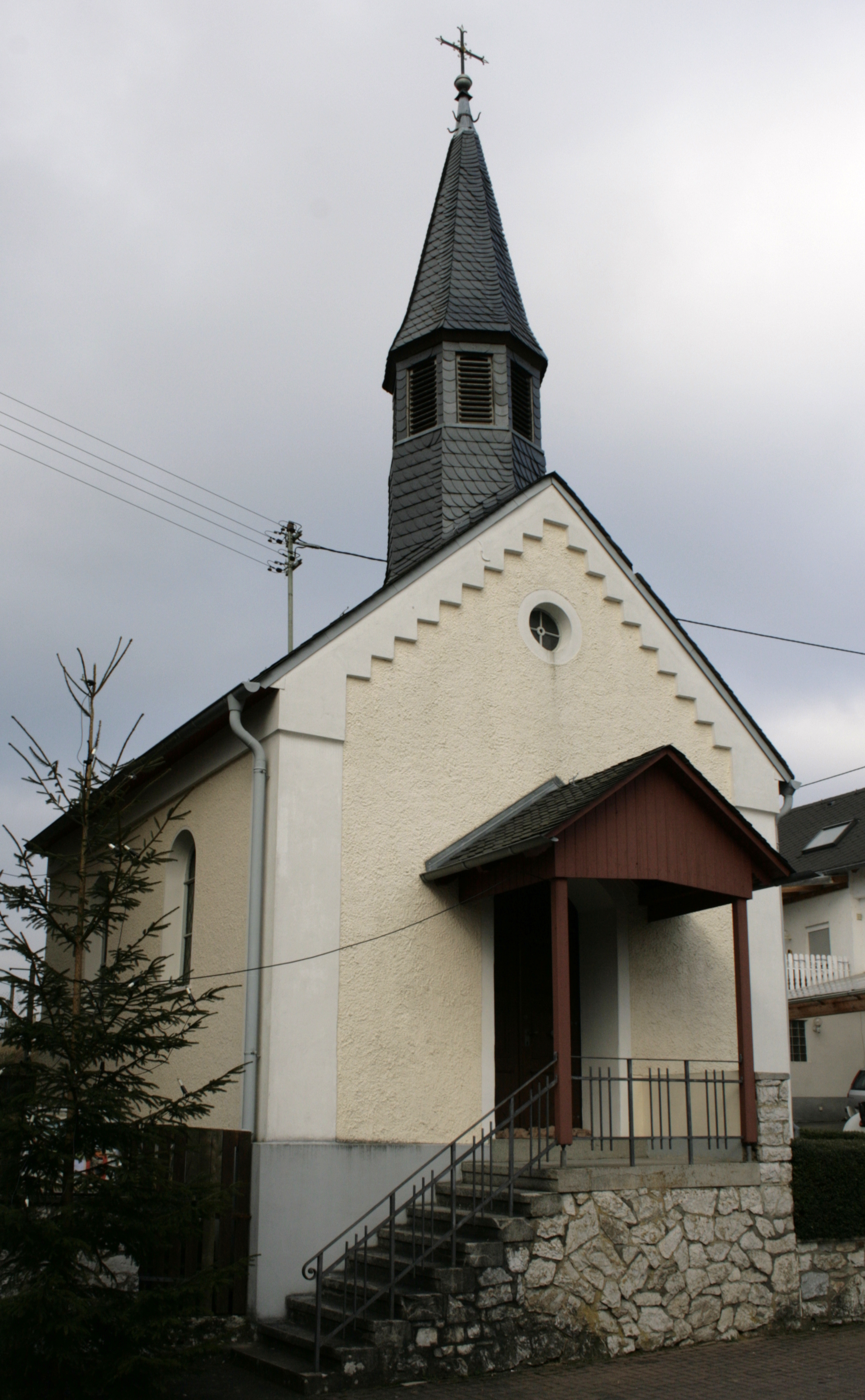 Kapelle in Hadamar-Faulbach, Deutschland